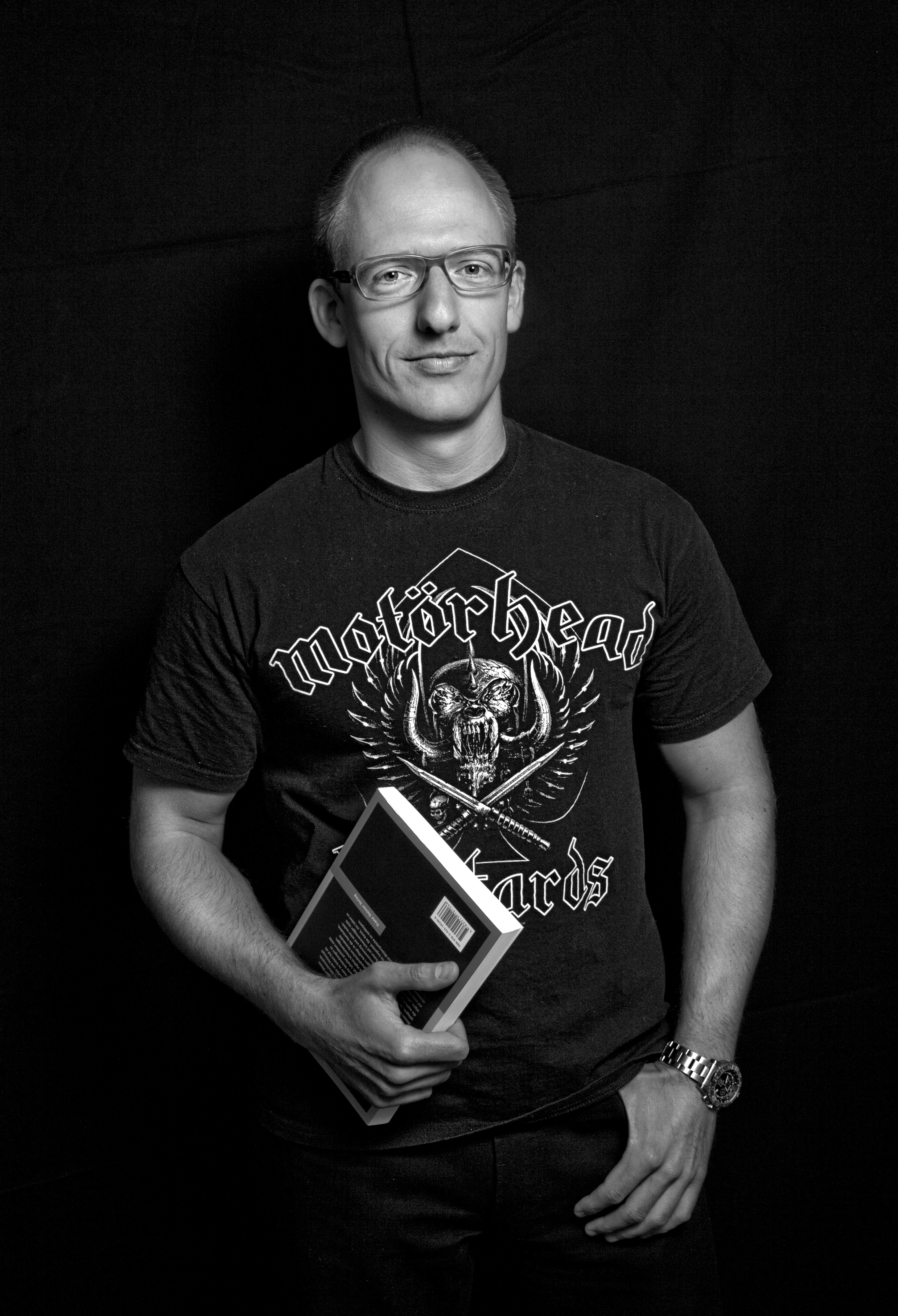 Jörg Scheller, 2012